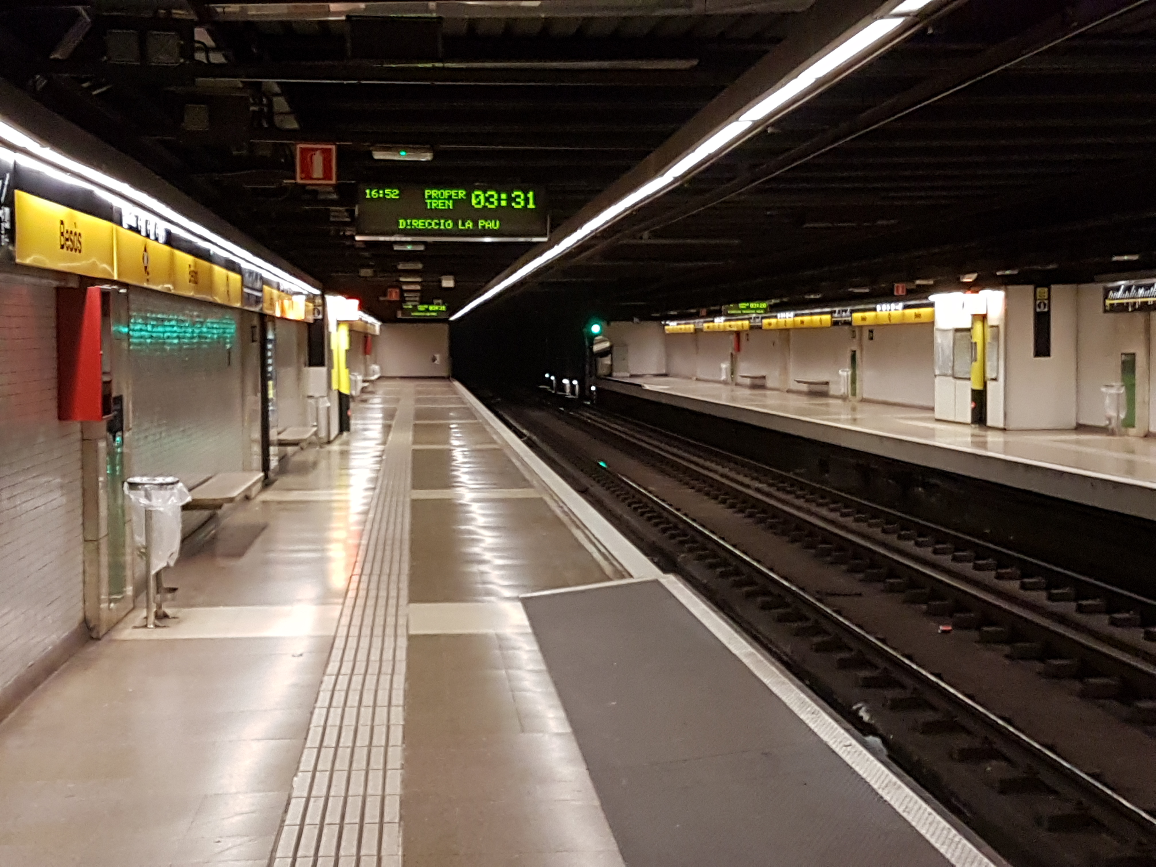 Andanes i vies de l'estació de metro de Besòs